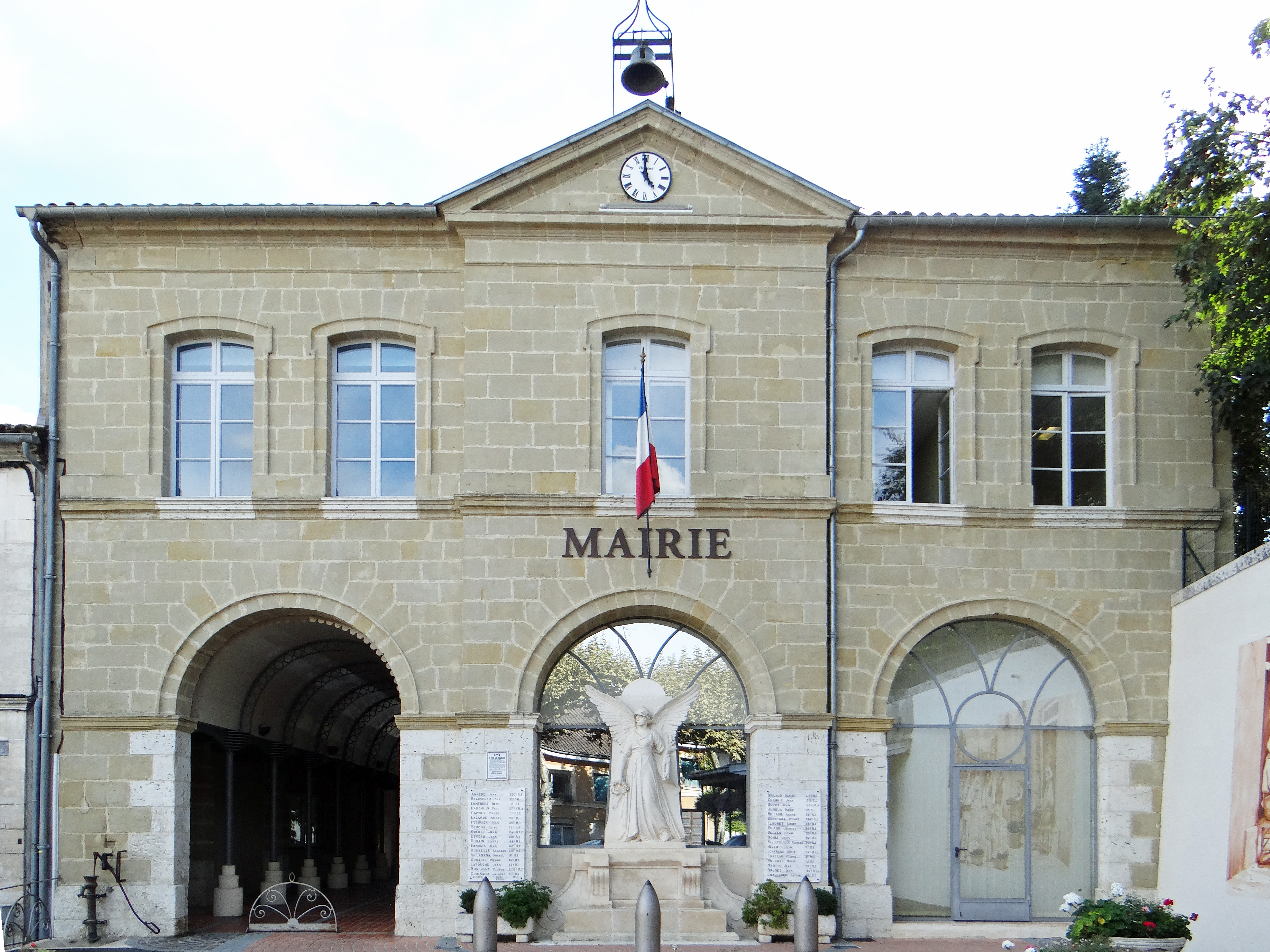 Seyches - Mairie